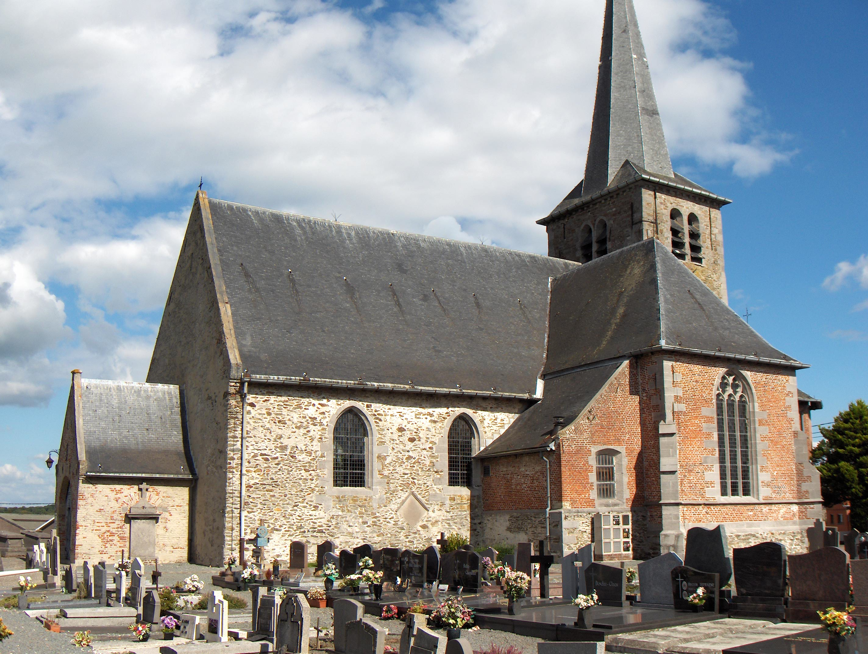 Beschreibung: Gemeinde Silly, Ortsteil Hoves (Belgien, Provinz Hennegau = Hainaut), église Saint-Maurice (älteste Teile aus dem 11. Jh.; Umbauten im 17. und 18. Jh.) Fotograf: Friedrich Tellberg Datum: 17. September 2005